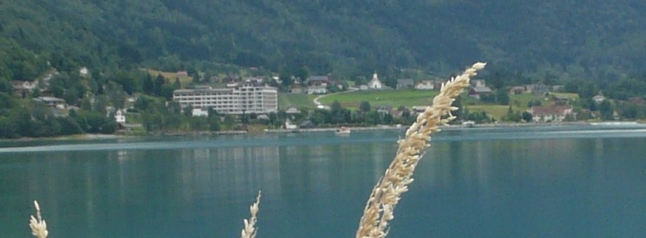 Zicht op Loen